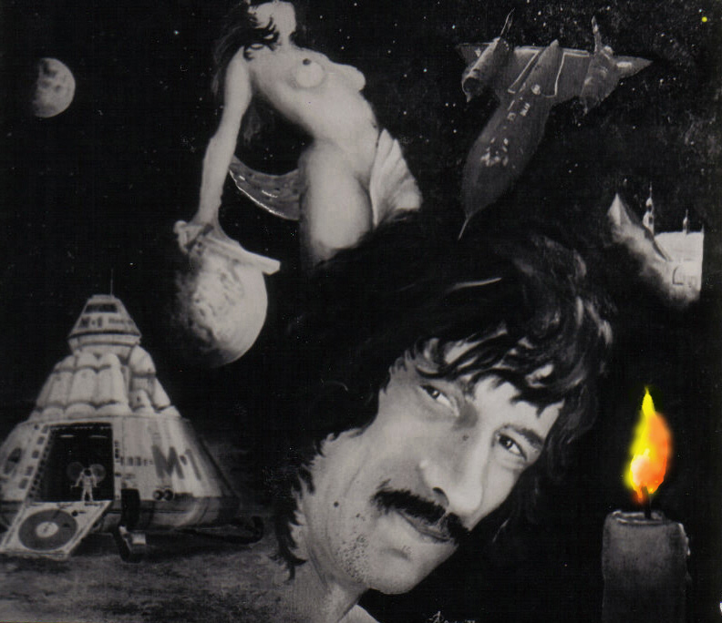 Piotr Domaradzki - autoportret ze świecą (autor Piotr Domaradzki)